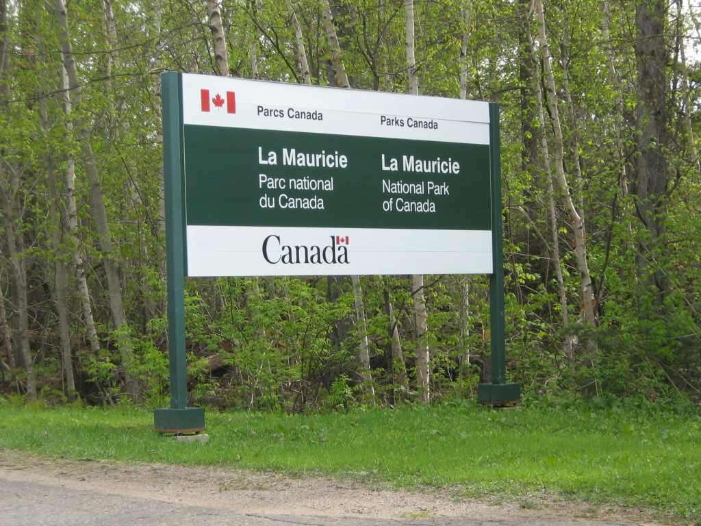 Entré du parc national de la Mauricie